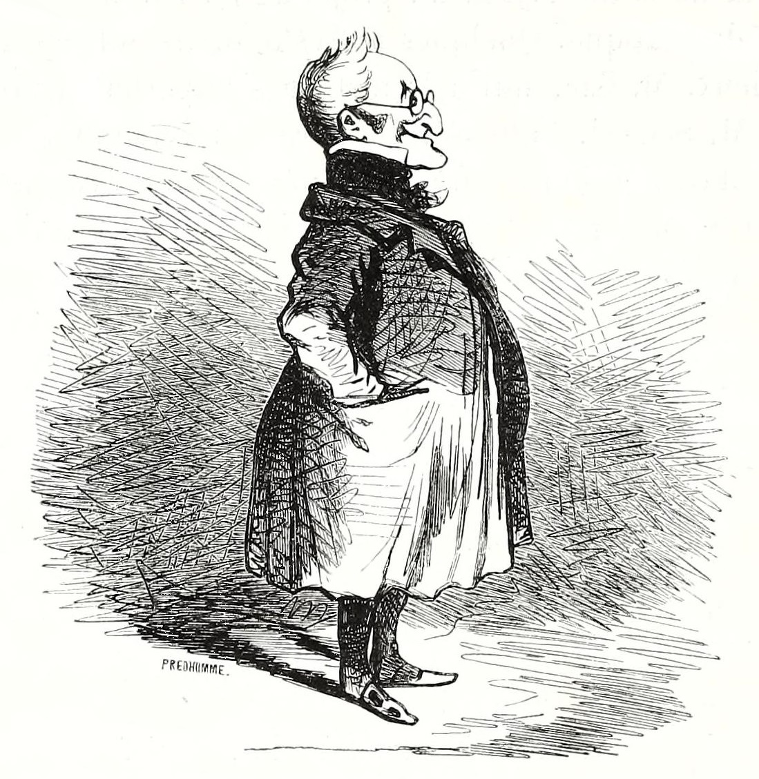 Caricature de Thiers, par Cham.